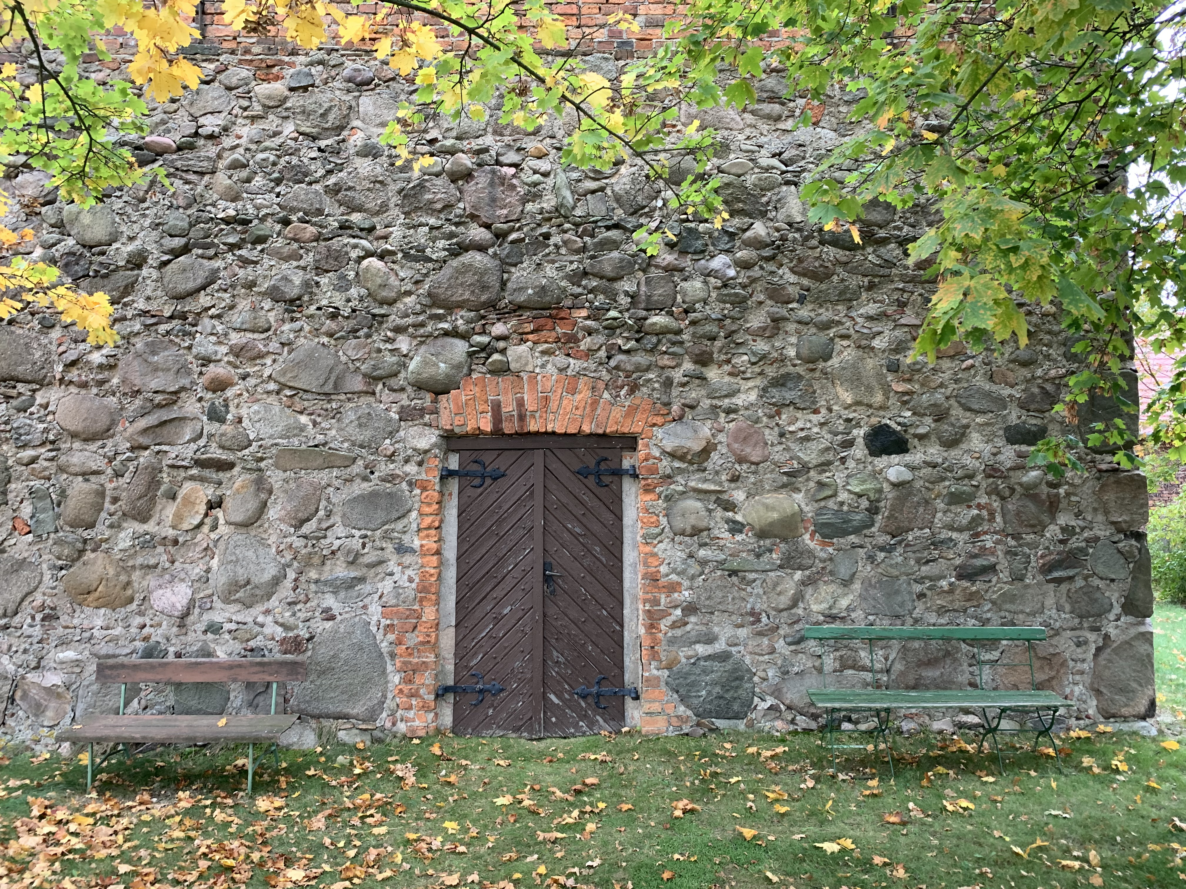 Die Dorfkirche Niederseefeld in der Gemeinde Niederer Fläming im Landkreis Teltow-Fläming ist eine Saalkirche aus dem 15. Jahrhundert. Im Innern steht unter anderem ein Kanzelaltar aus dem Jahr 1883.